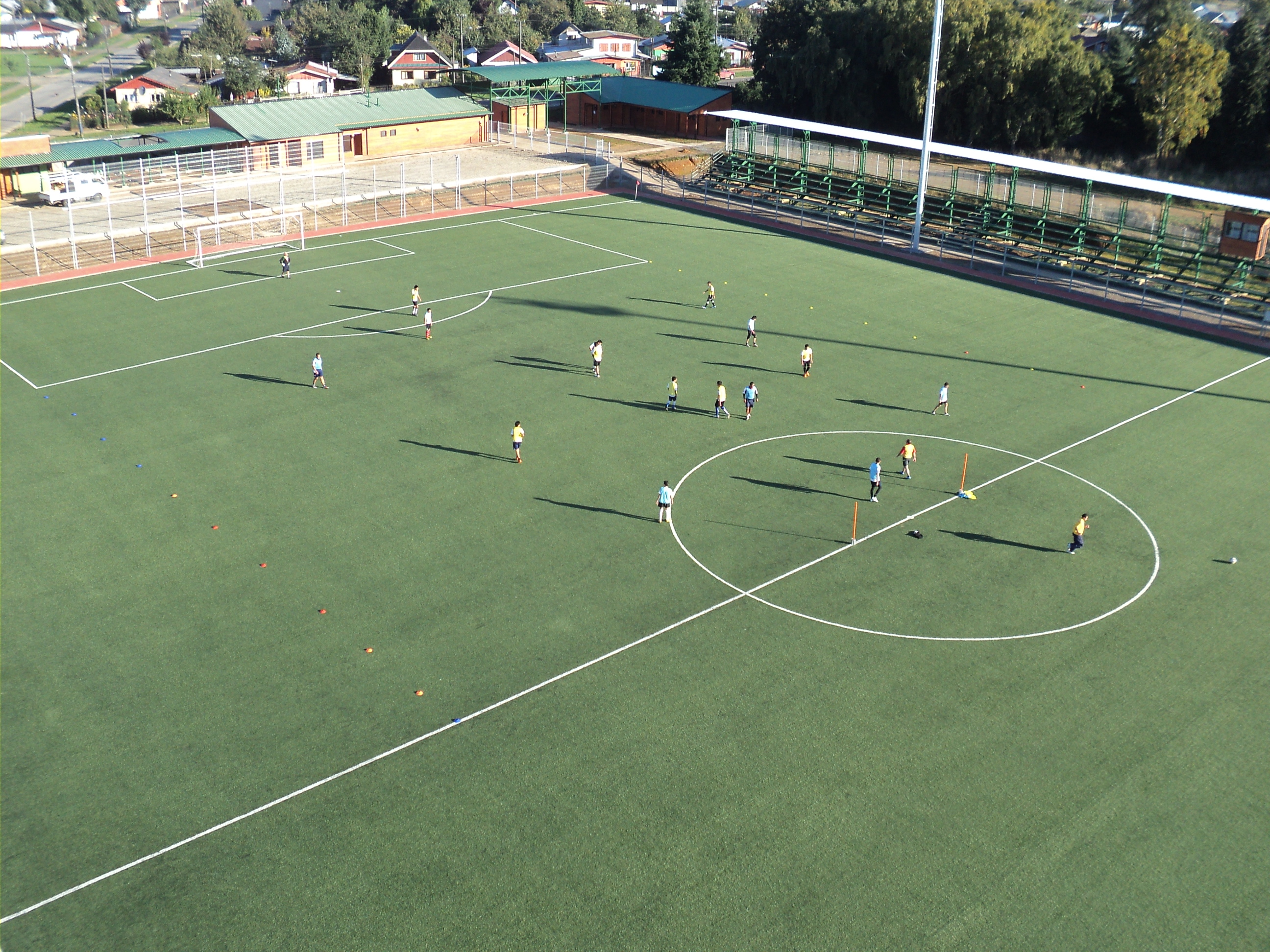 Vista aérea del nuevo Estadio Centenario de Purranque, Región Los Lagos, Chile.